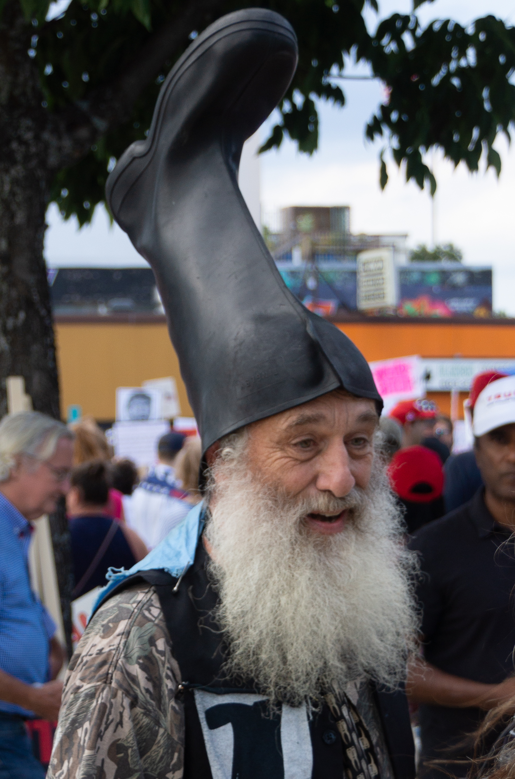 Vermin Supreme